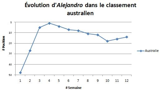 L'évolution des 13 premières semaines du classement d'Alejandro.